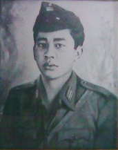 Potret Kapten Tubagus Muslihat di Museum Perjuangan Bogor.